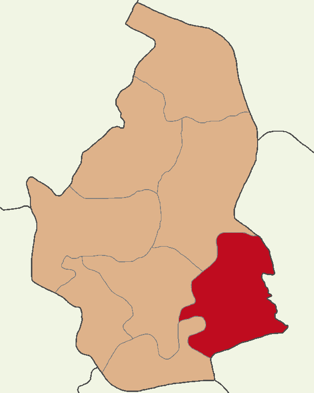 Ürgüp ilçesinin konumu